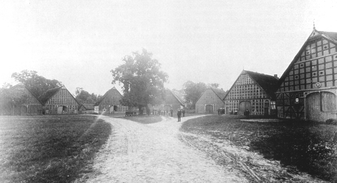 Köhlen